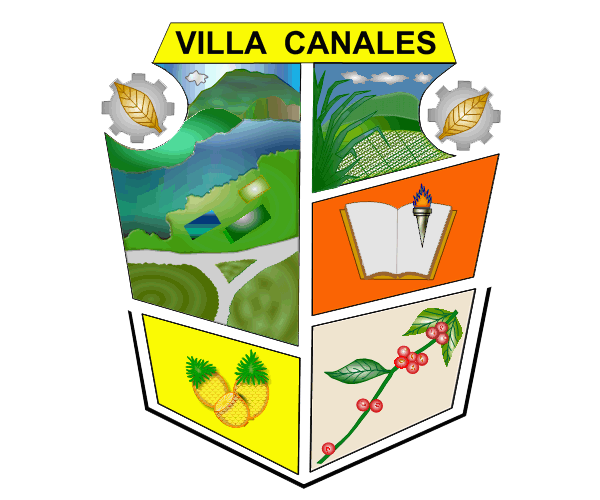 Escudo de la Municipalidad de Villa Canales, Guatemala